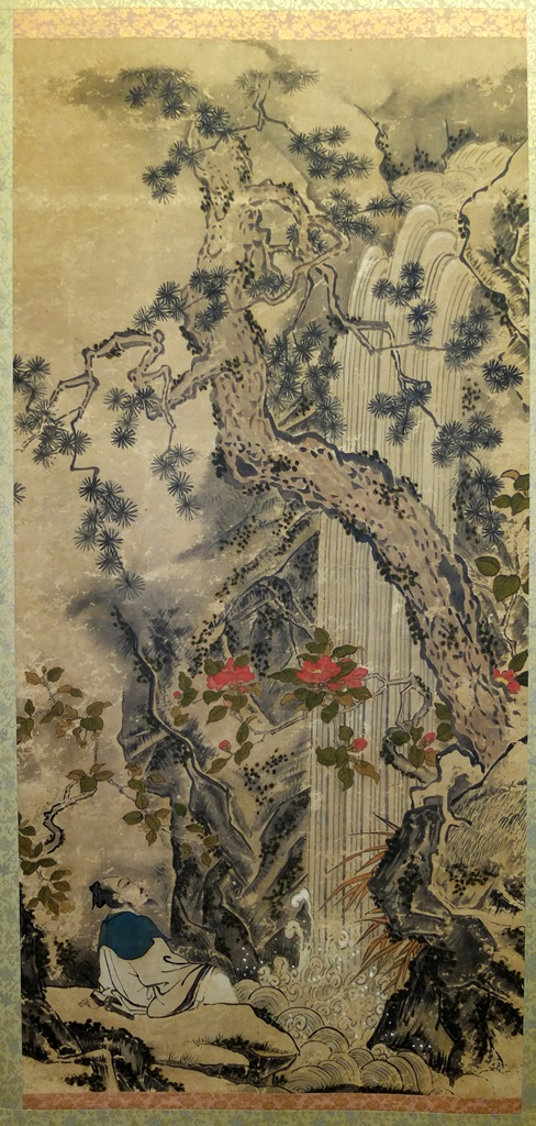 村岡山名七代・山名義徳公（雅号：文鶴）筆。「猿尾滝観瀑図」（『山名蔵』蔵）